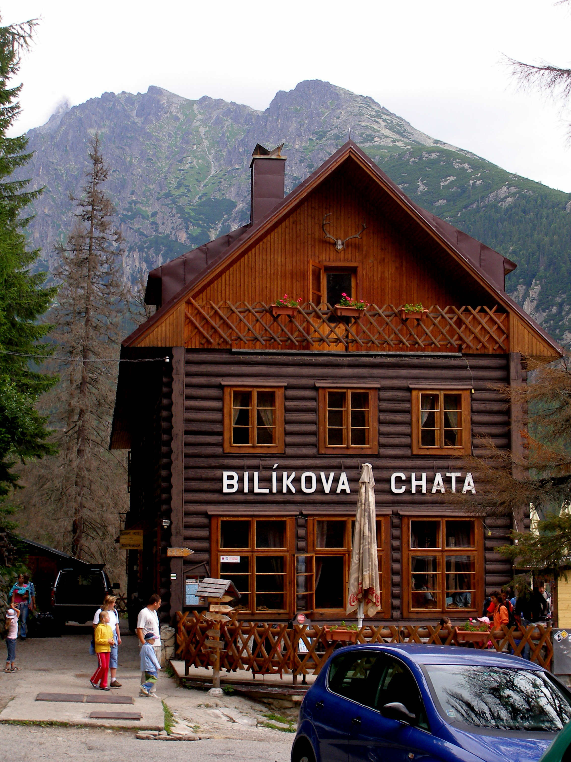 Bilíkova chata- horská chata pod Hrebienkom. Vysoké Tatry.